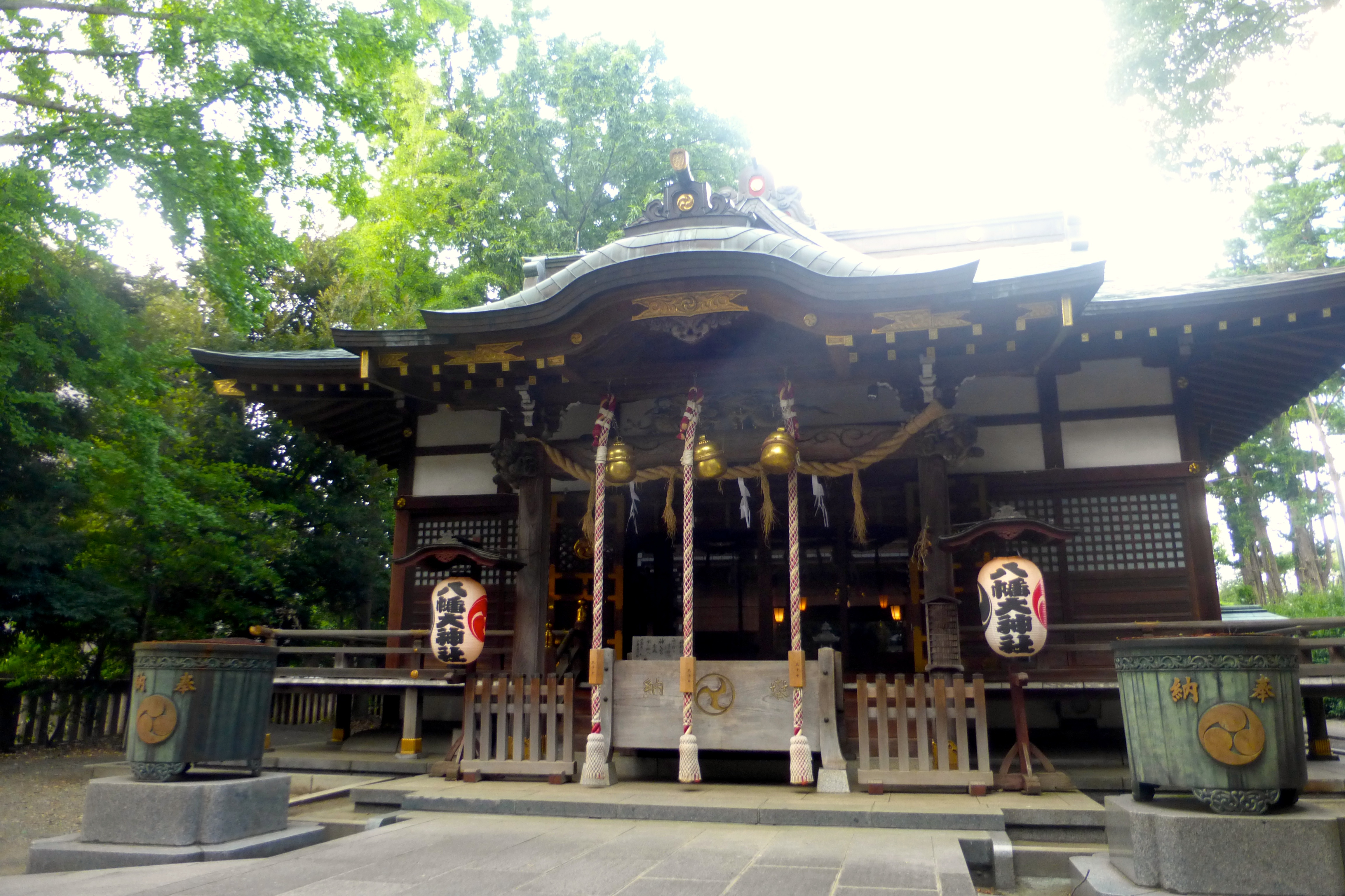 八幡大神社(はちまんだいじんじゃ)は東京都三鷹市にある神社。